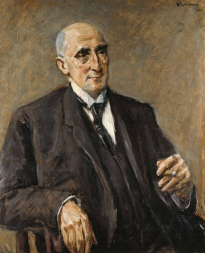 Portrait des Textilfabrikanten und Kunstsammlers Carl Lewin, Breslau